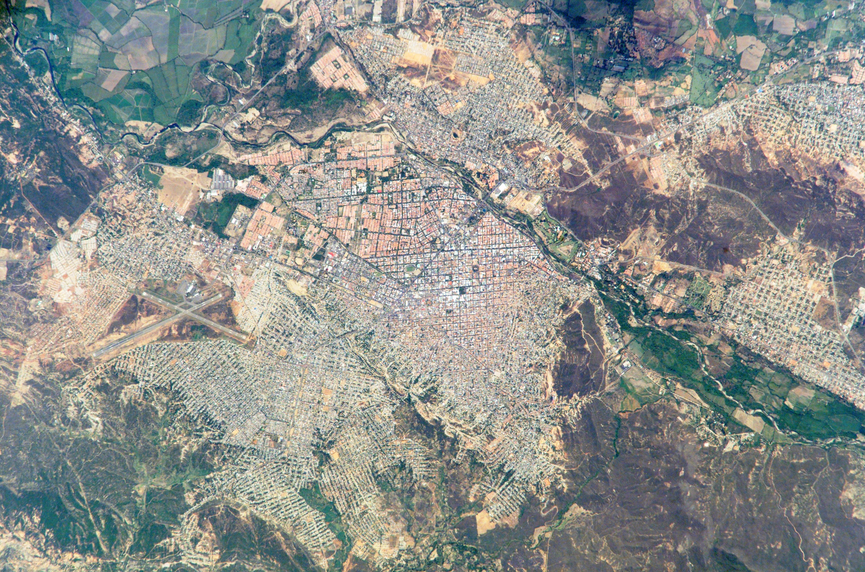 Imagen Satelital de Cúcuta